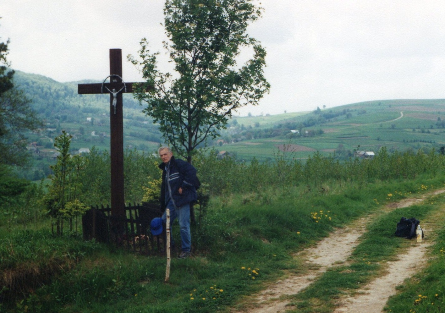 Chelm i Jaszczurowa(województwo podkarpackie) znad Chytrówki, Pogórze Strzyżowskie, 9.5.1999r.